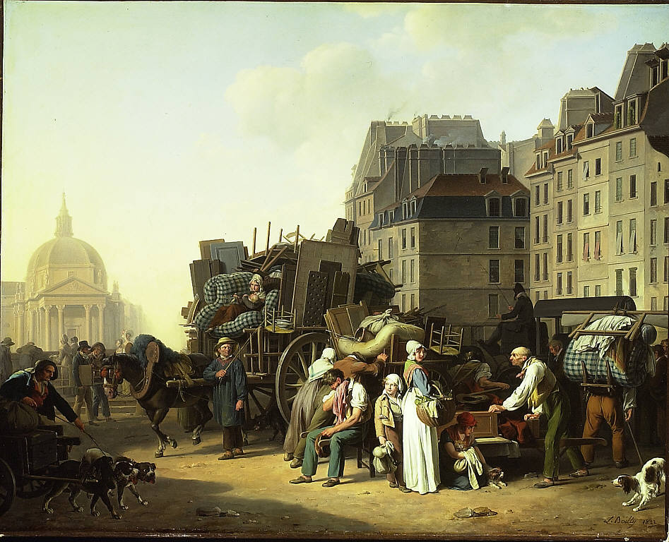 Roma Piazza del Popolo Chiesa di Santa Maria dei Miracoli.